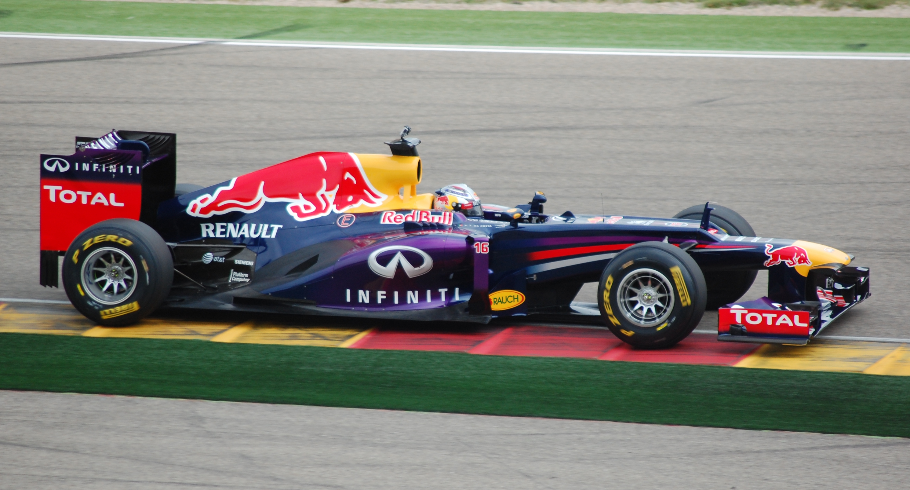 Aragonés: António Félix da Costa Motorland